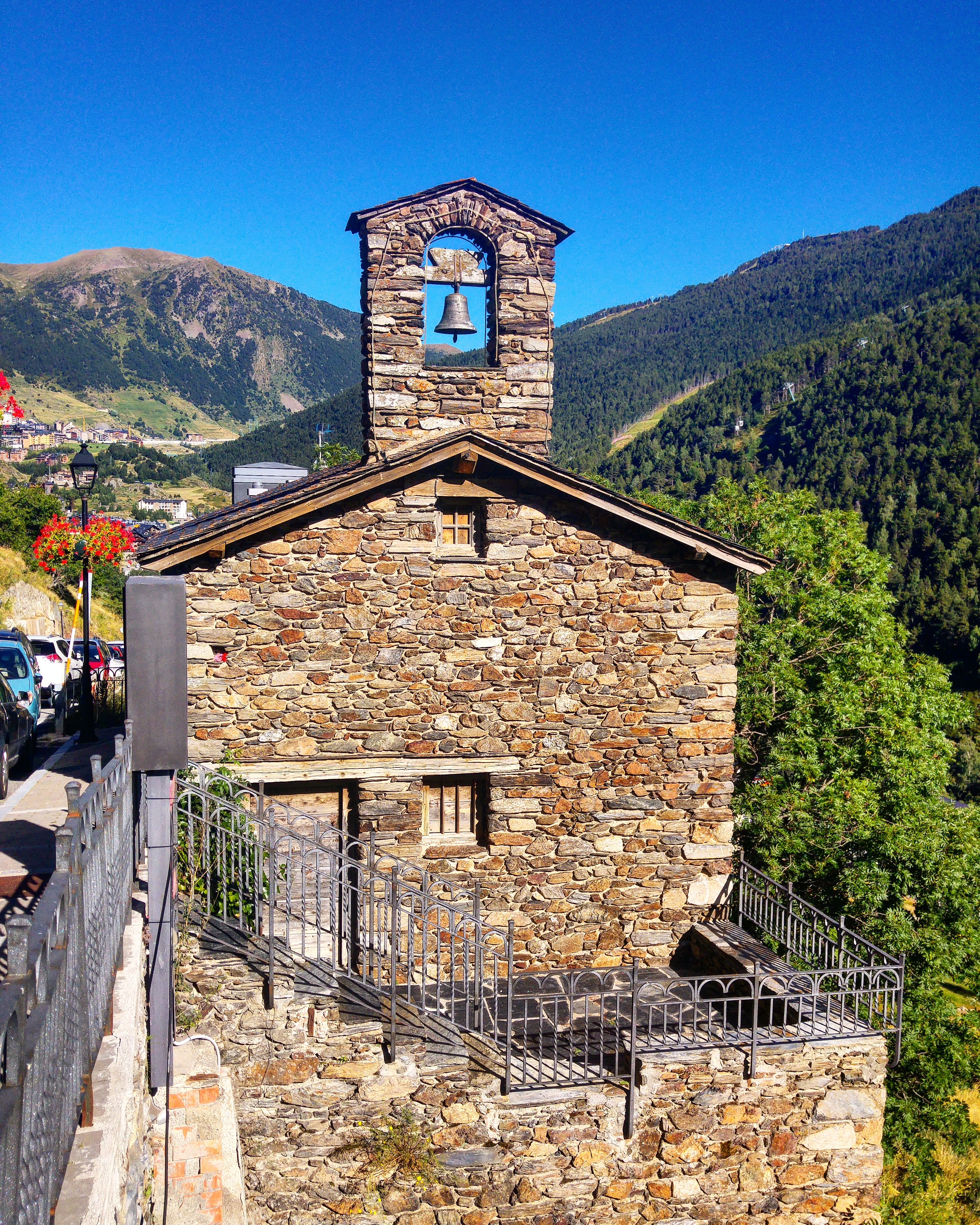 Sant Jaume de Ransol, església preromànica situada a la parròquia de Canillo, Principat d'Andorra